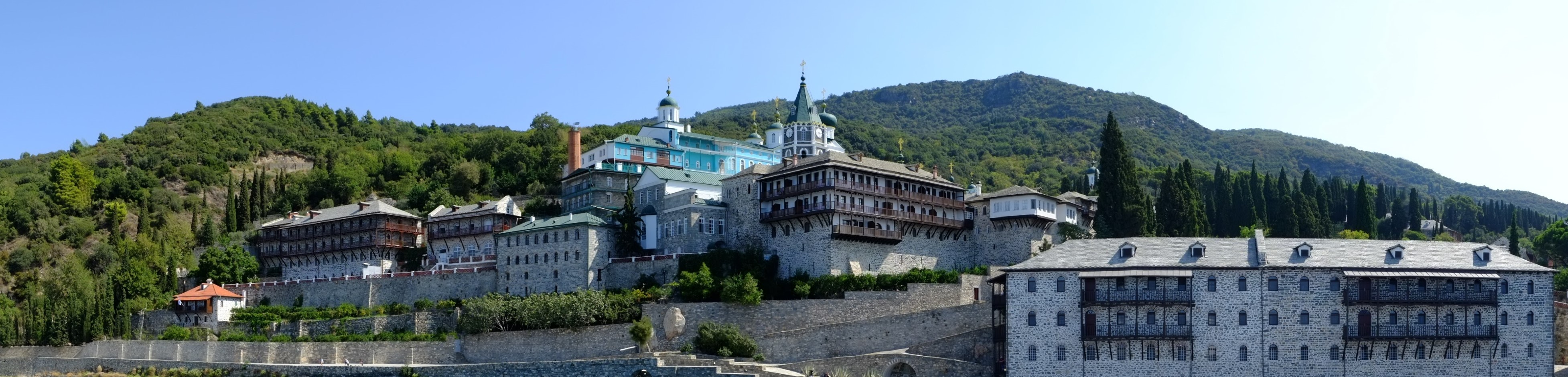 Μονή Αγίου Παντελεήμονος«Μονή Αγίου Παντελεήμονος»